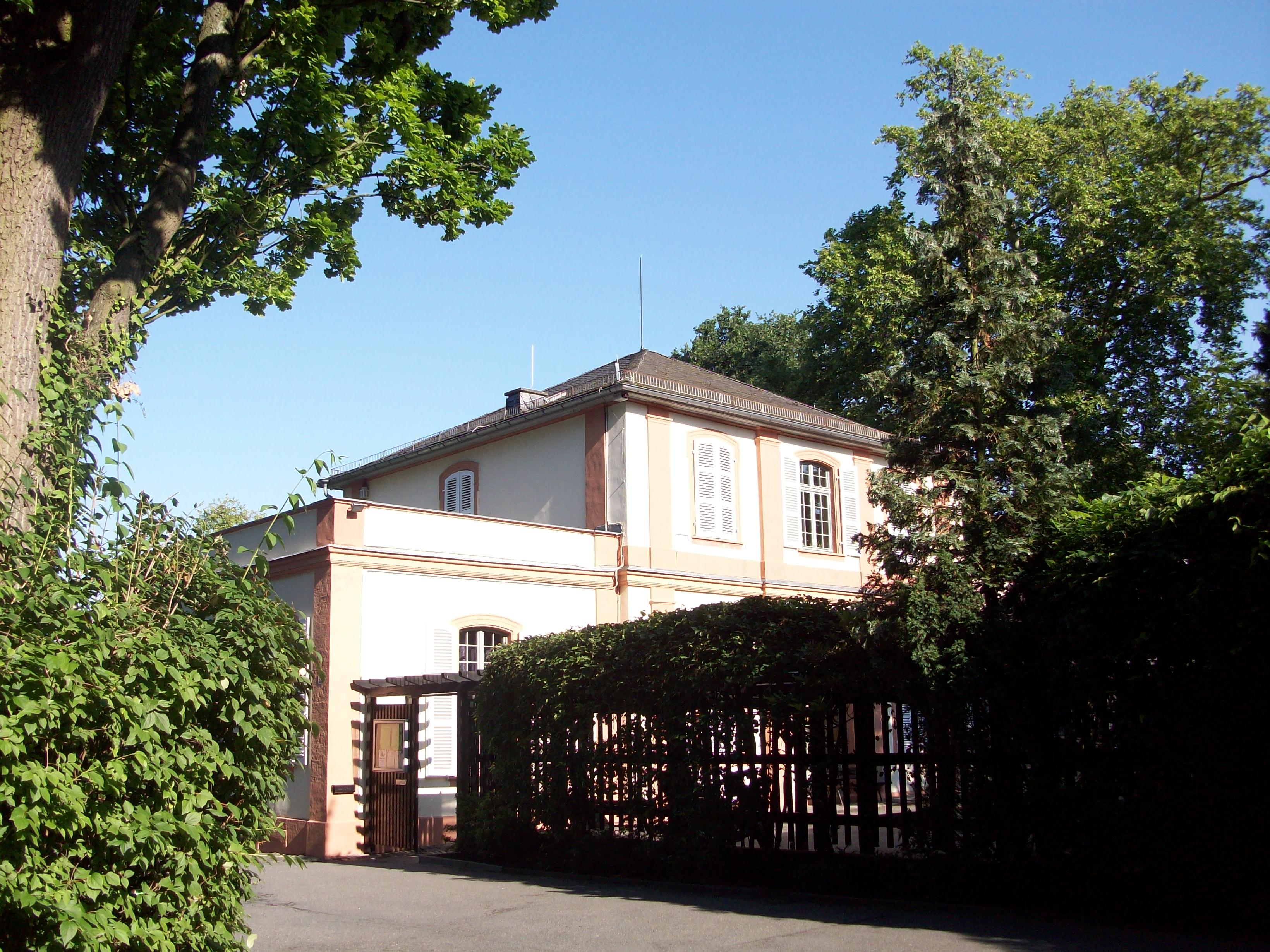 Das Gartenpalais aus Richtung Südosten mit der Rückseite des Palais und dem Eingang zum Innenhof